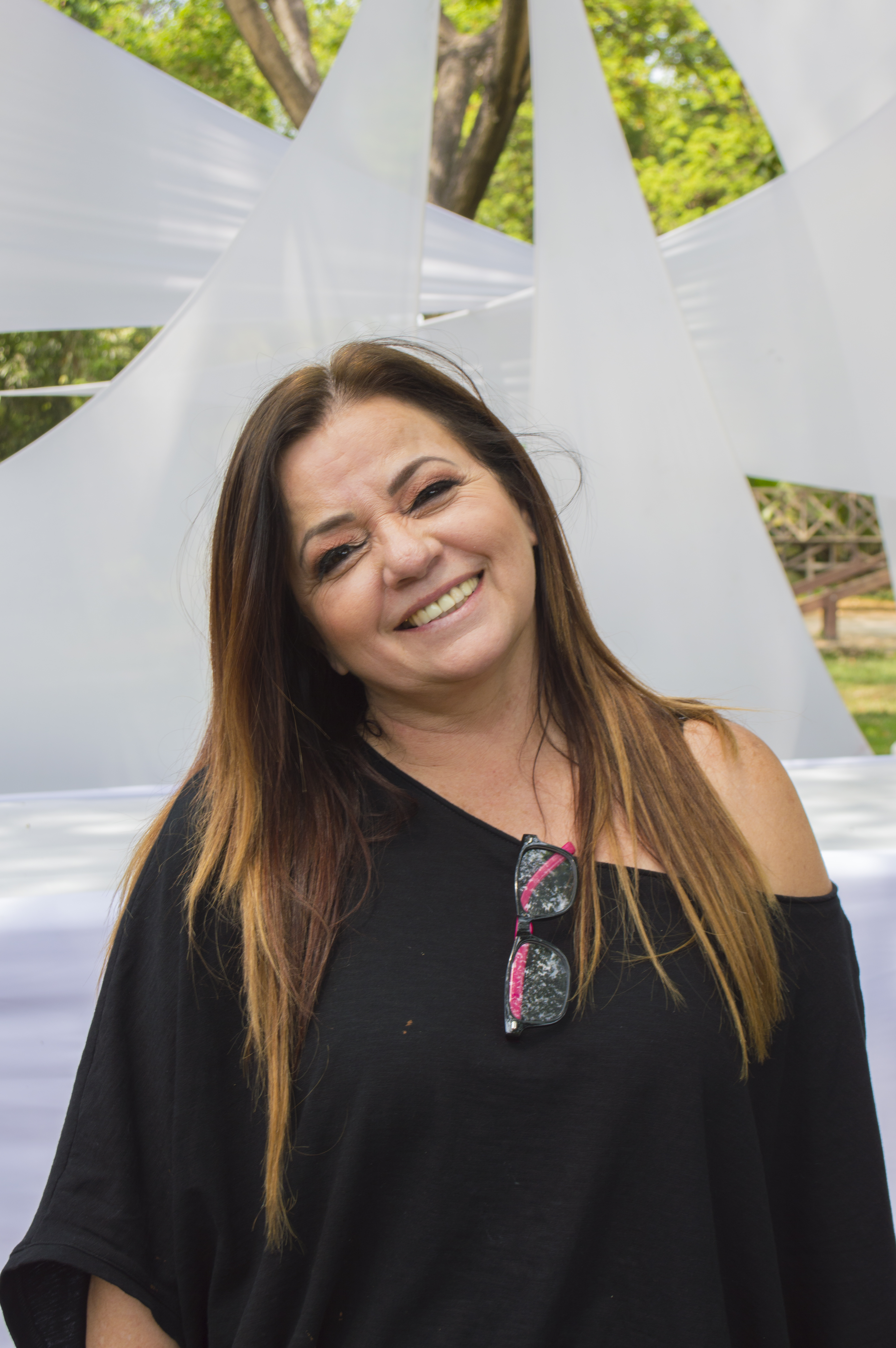 ESTA IMAGEN ES DE MI PROPIEDAD Y LA DEJO A DOMINIO PÚBLICO PARA QUE SEA USADA POR WIKIPEDIA Y QUIEN DESEE USARLA, ACLARO EN LA DESCRIPCIÓN DE LA MISMA PORQUE LAMENTABLEMENTE SE ME HA BORRADO GRAN PARTE DE MI TRABAJO SUBIDO EN ESTA PLATAFORMA PENSANDO QUE NO SOY YO QUIEN HACE LAS FOTOGRAFÍAS.